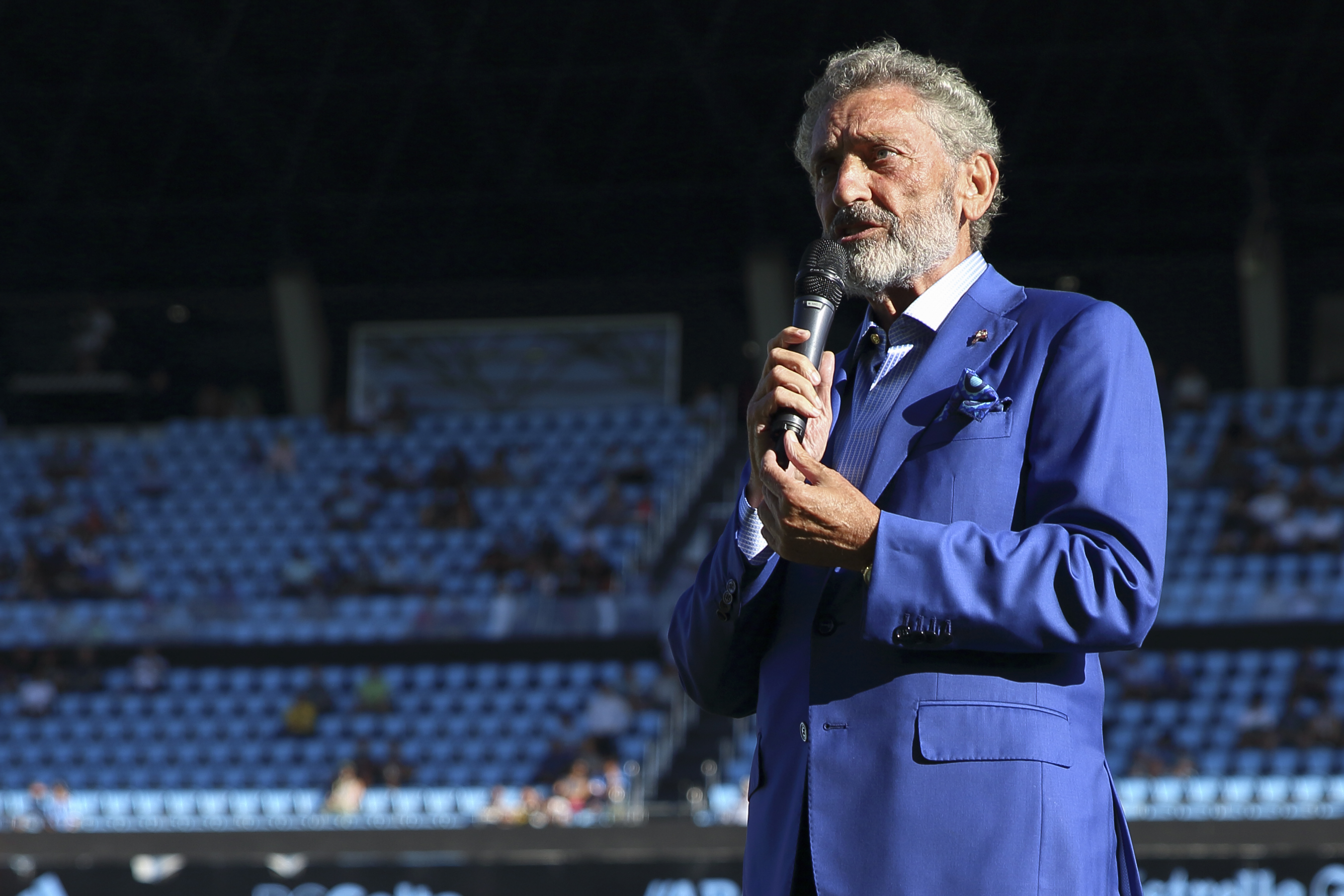 Presentación RC Celta - Temporada 18/19